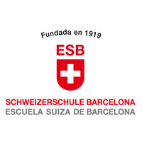 Wappen ESB